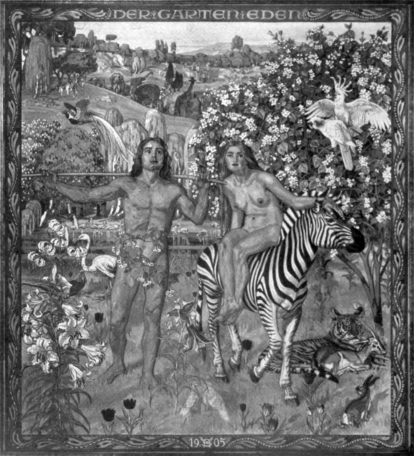 Le Jardin d'Eden